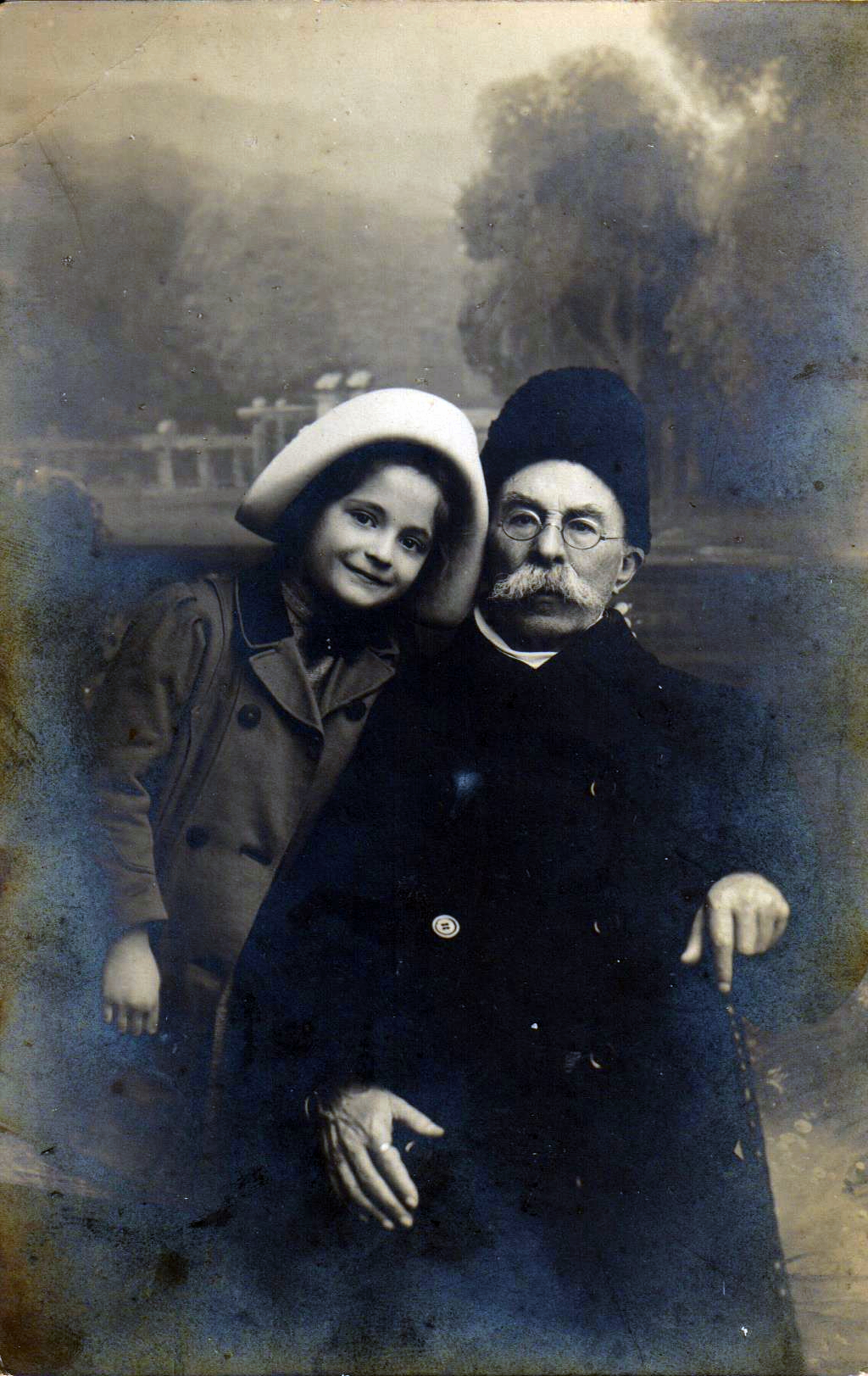 Этнограф Михаил Федорович Комаров (1844-1913)